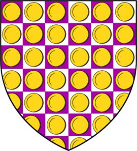 Blason de la Casa en la obra Cancion de Hielo y Fuego de G. R. R . Martin